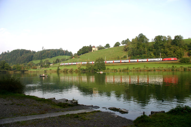 Rotsee Luzern